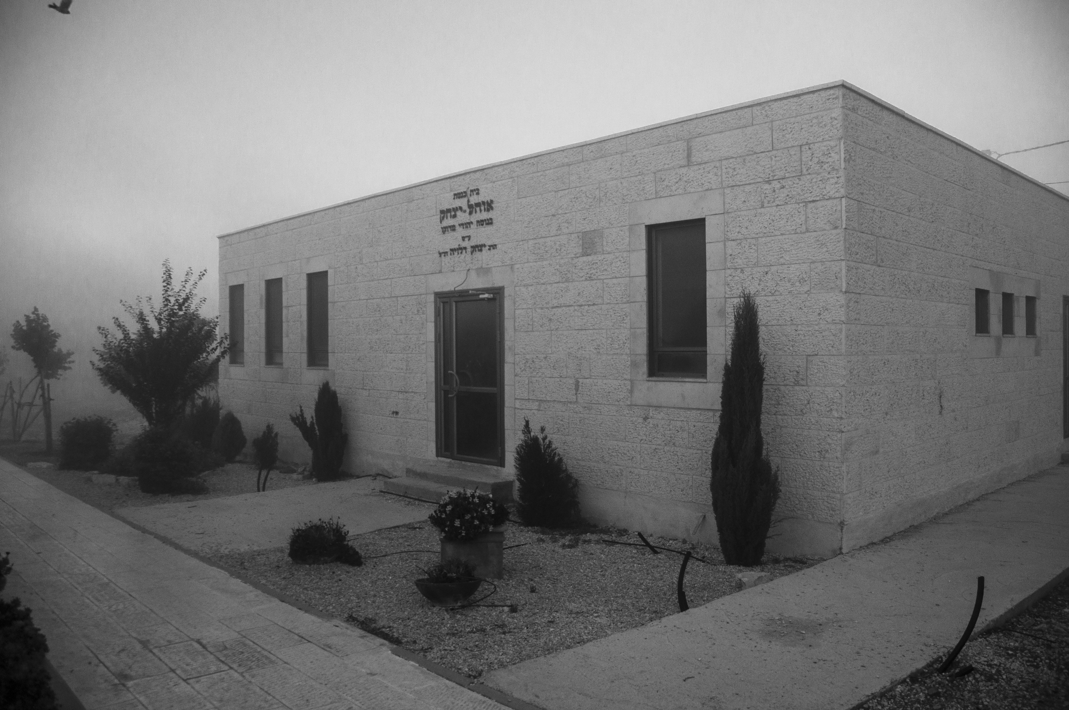 בית כנסת וספריה ע"ש רבי יצחק דלויה בישוב הר ברכה